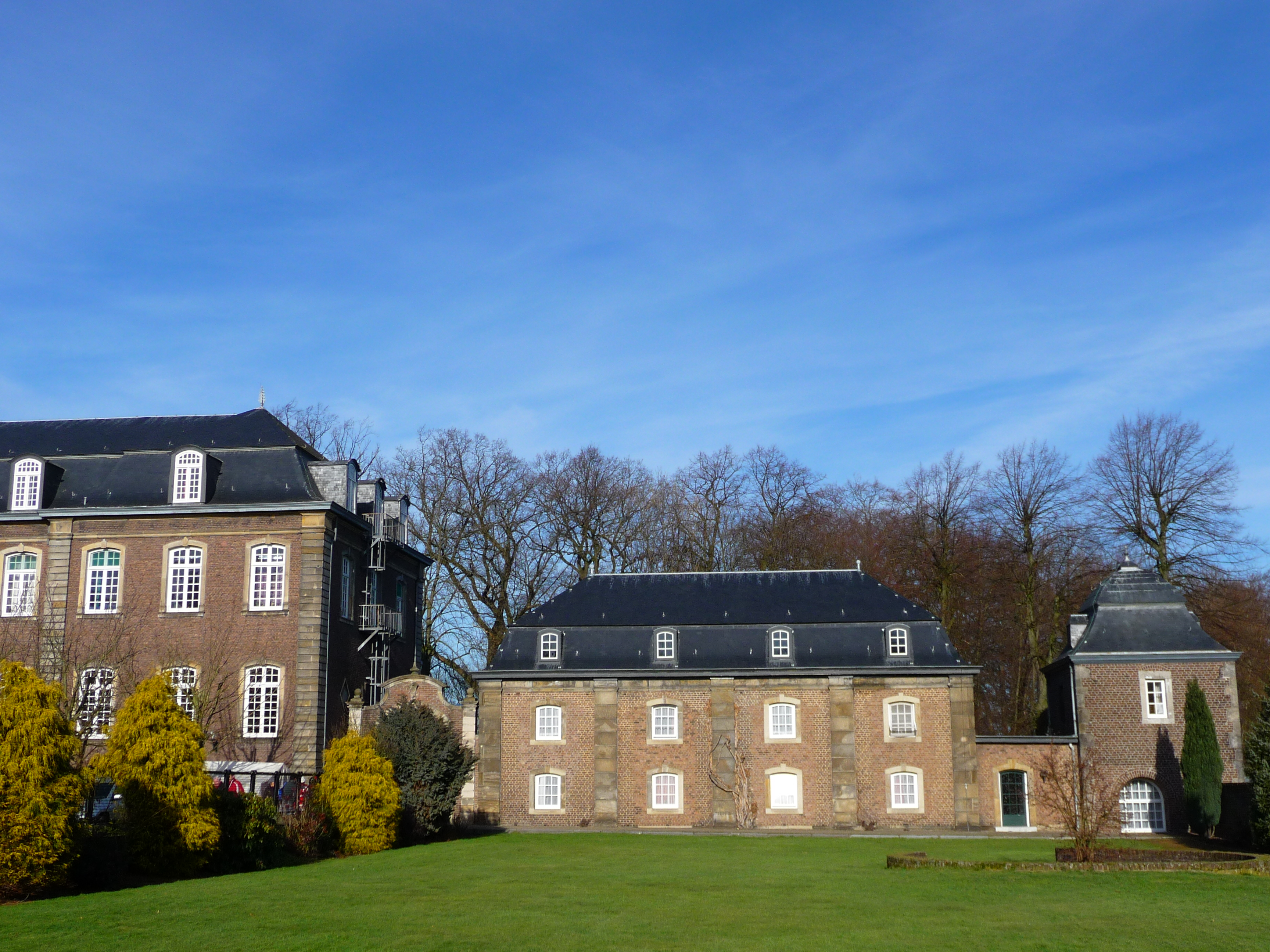 The graden of Abbey Rolduc in Kerkrade